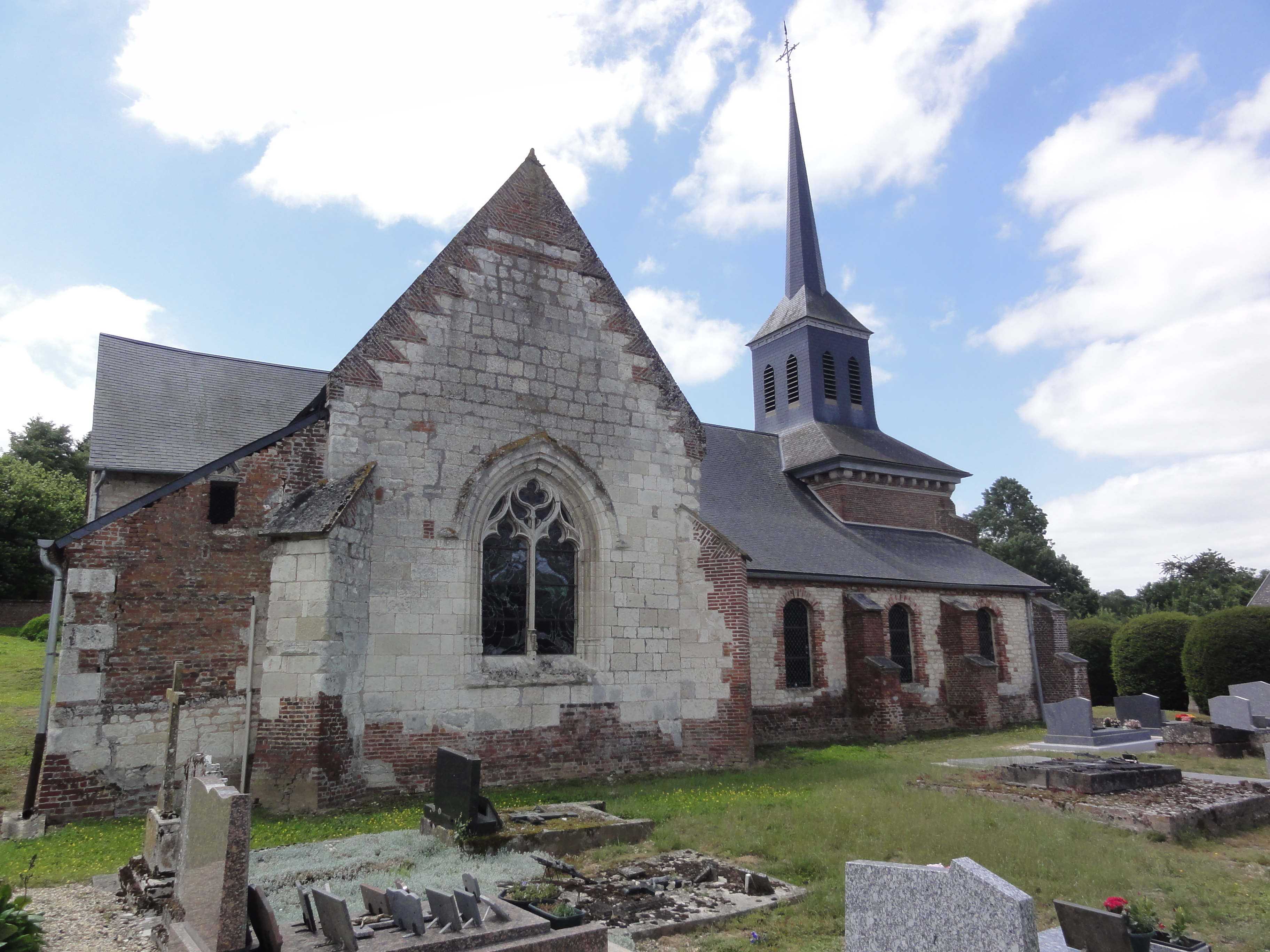 Saint-Pierremont (Aisne) église